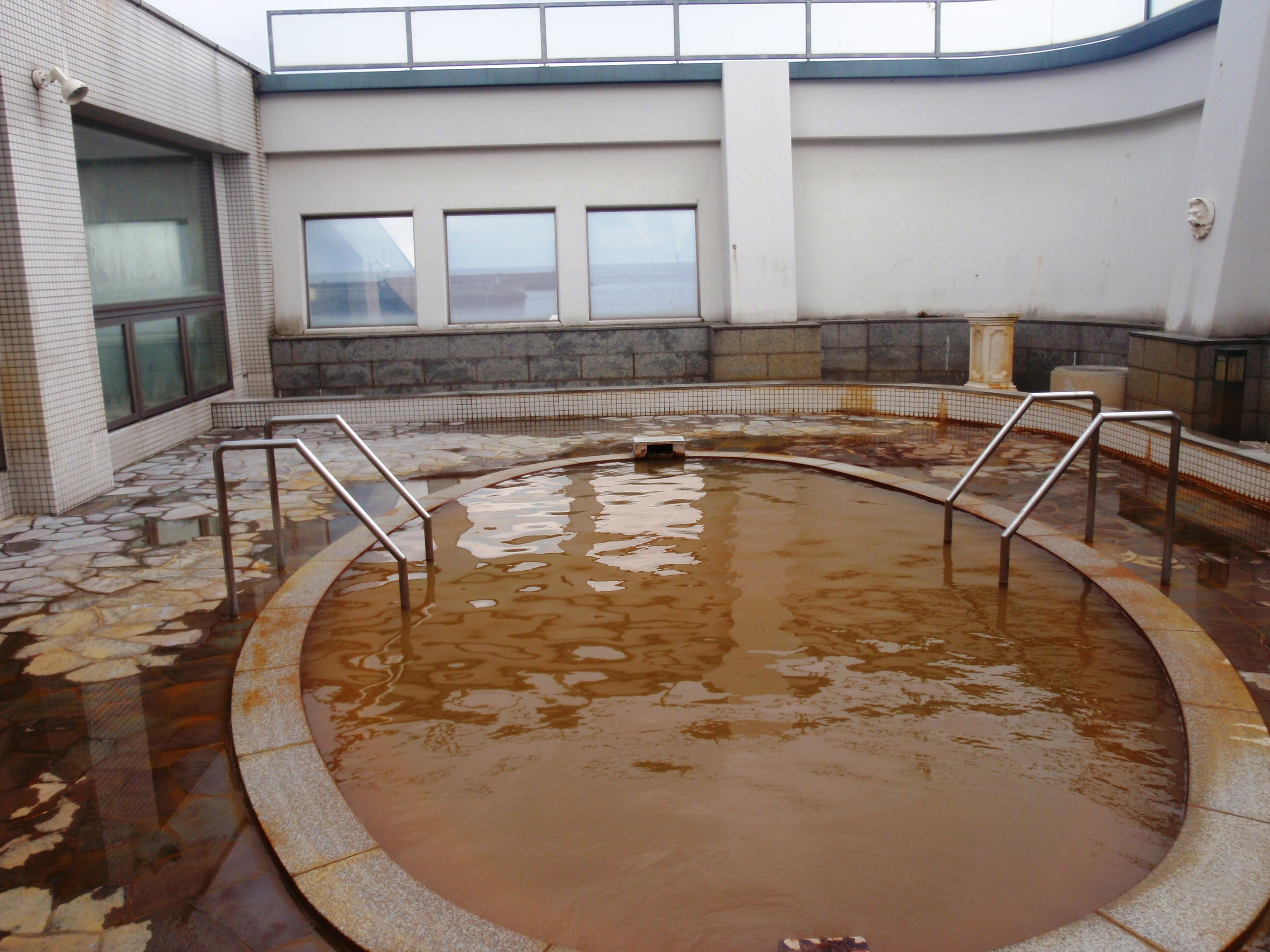 豊浦温泉露天風呂